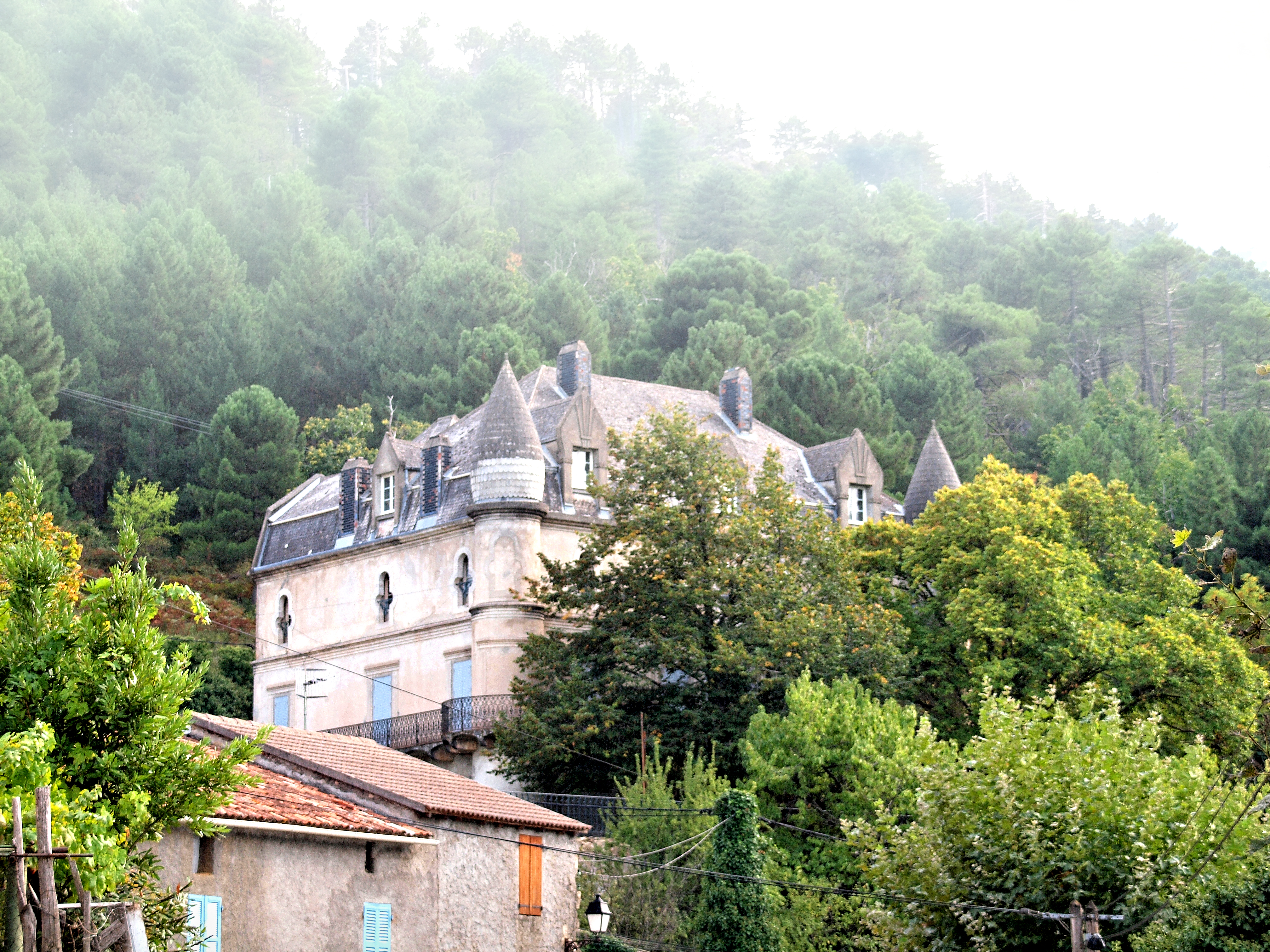 Muracciole, Centre Corse (Corse) - Vue du château Renaissance